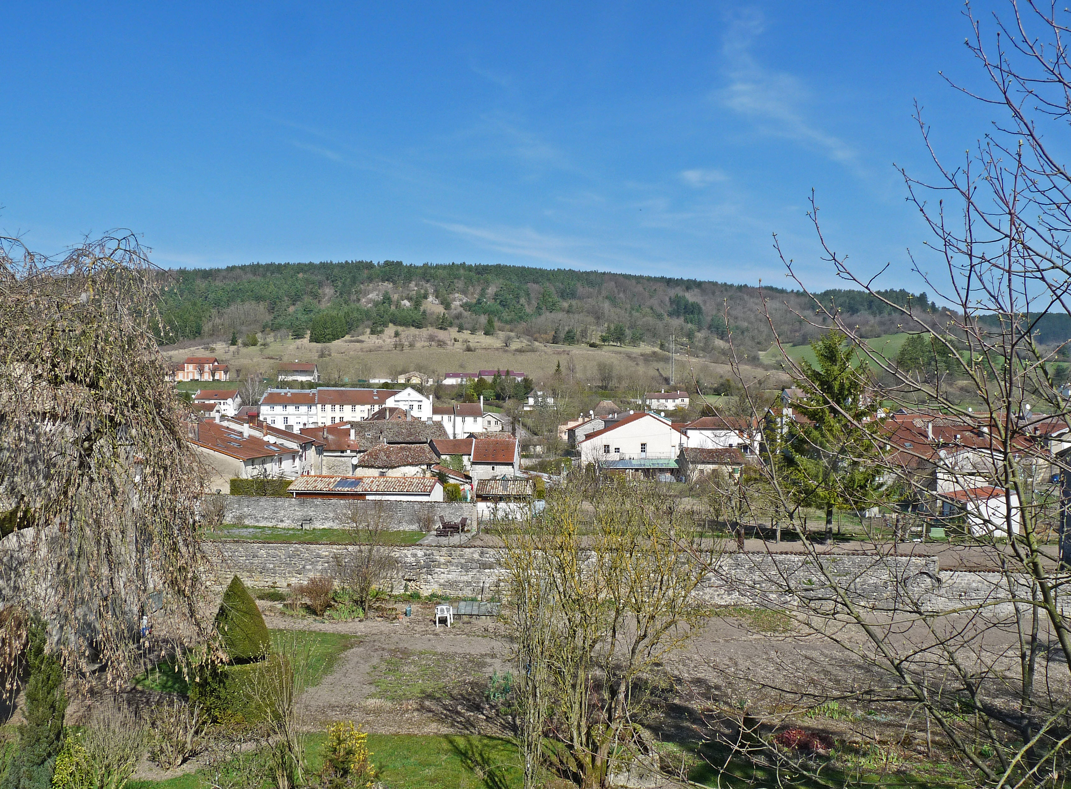 Environnement vallonné à Poissons (Haute-Marne).